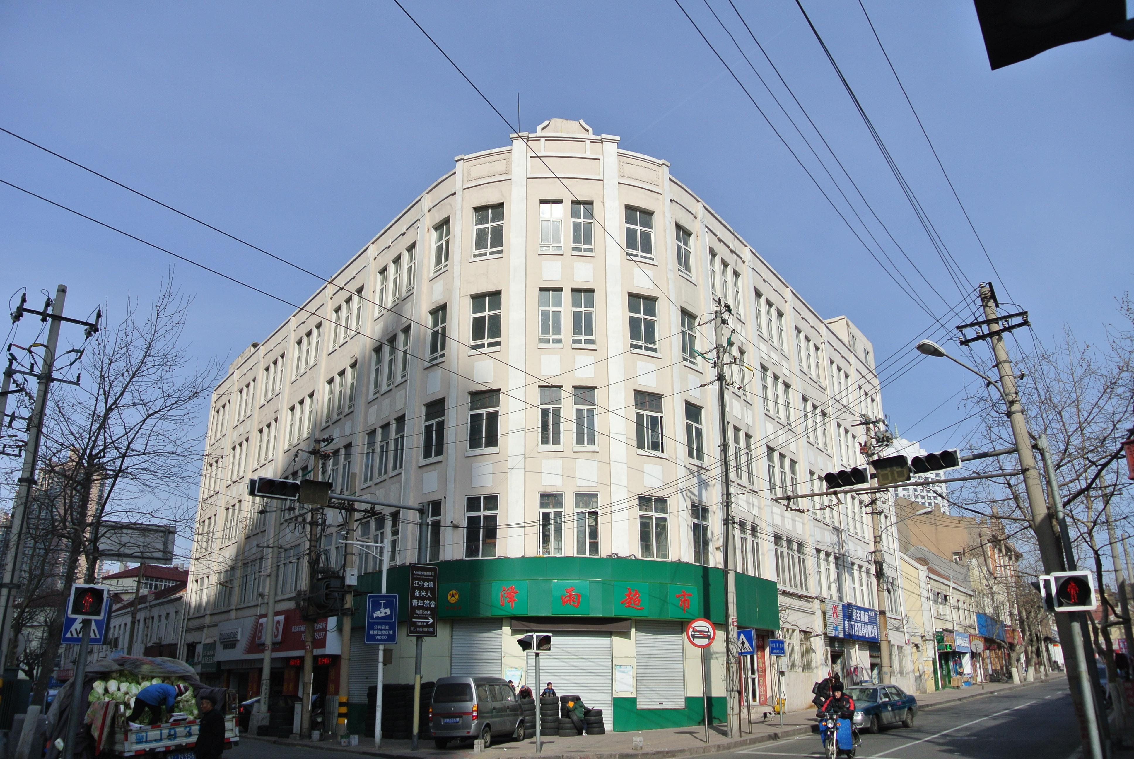 青岛洪泰商场旧址